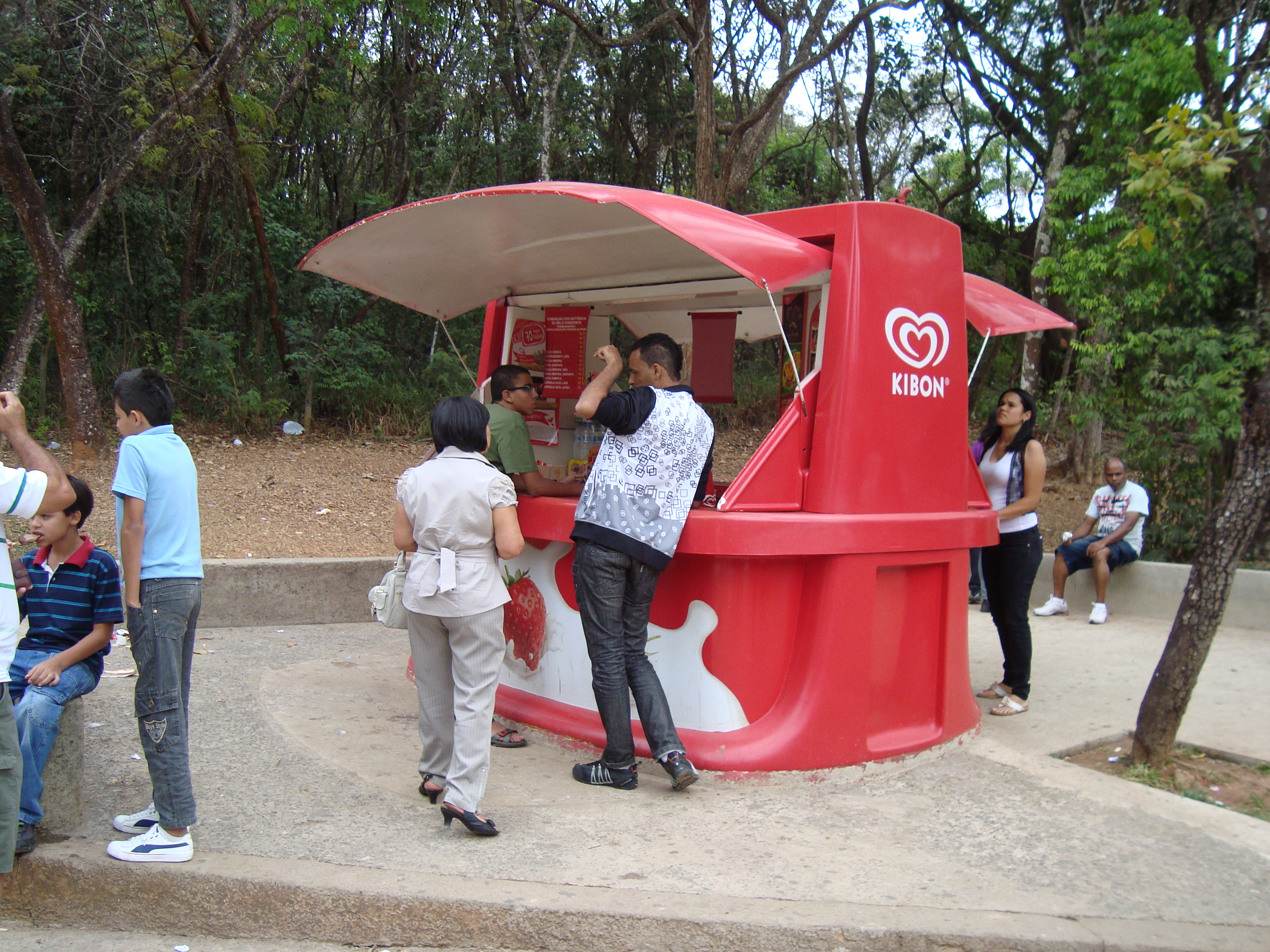 Quioque da Kibon no Zoológico de Belo Horizonte, Minas Gerais, Brasil.